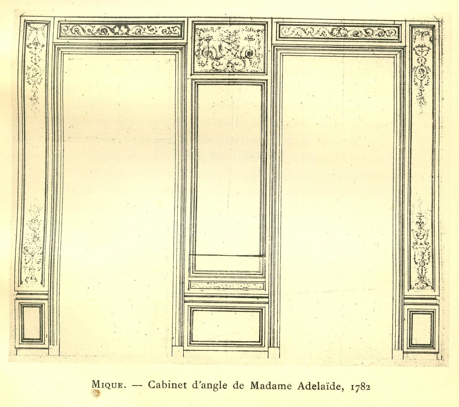 Elevation d'une paroi du cabinet d'angle, avec modification du décor proposé par l'architecte Richard Mique. Archives nationales. 1782.